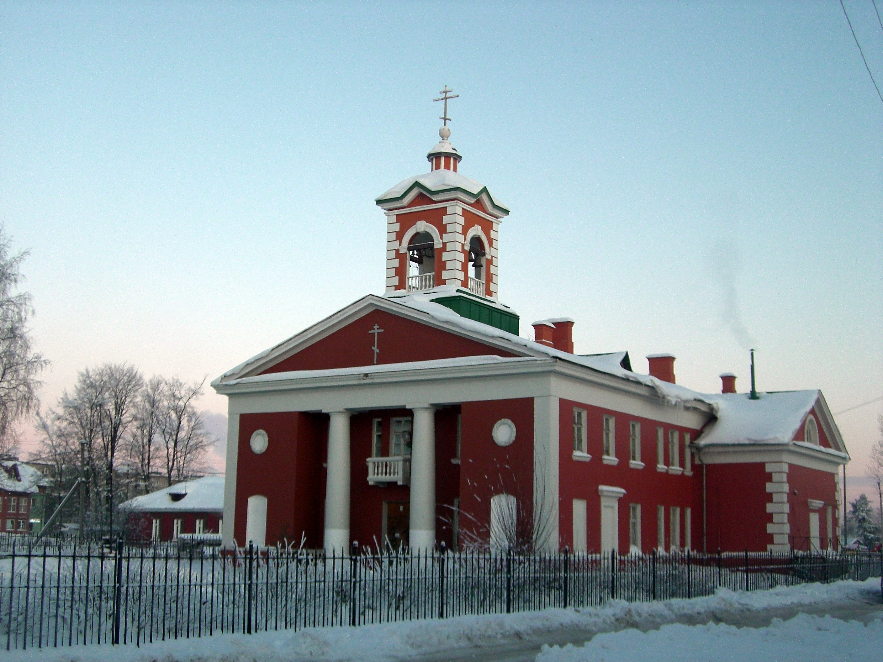 Церковь святого Иоанна Милостивого (Иоанновский храм) - действующий православный храм в городе Отрадное Ленинградской области.